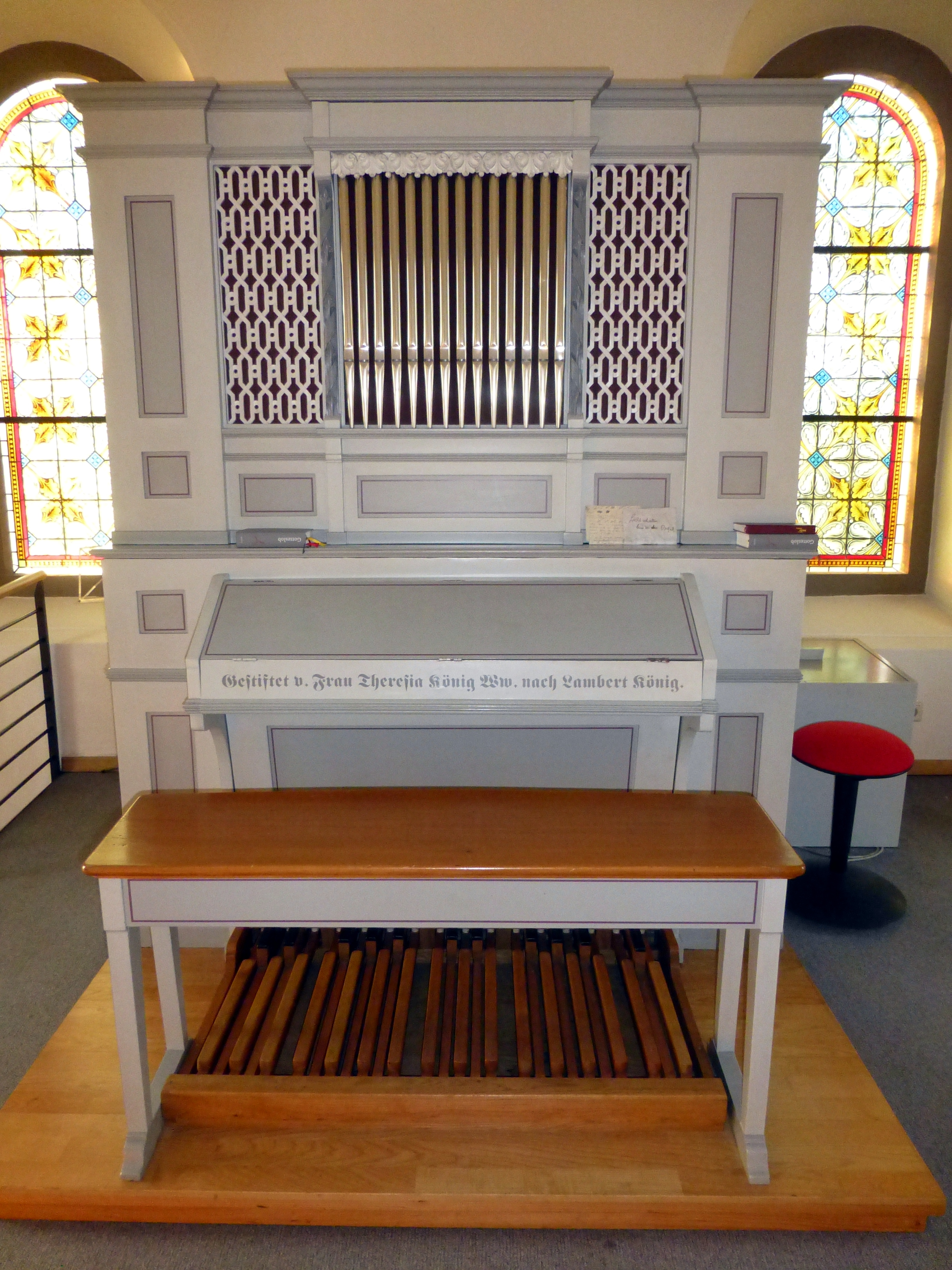 die Orgel in der St. Antoniuskapelle in Lustenau